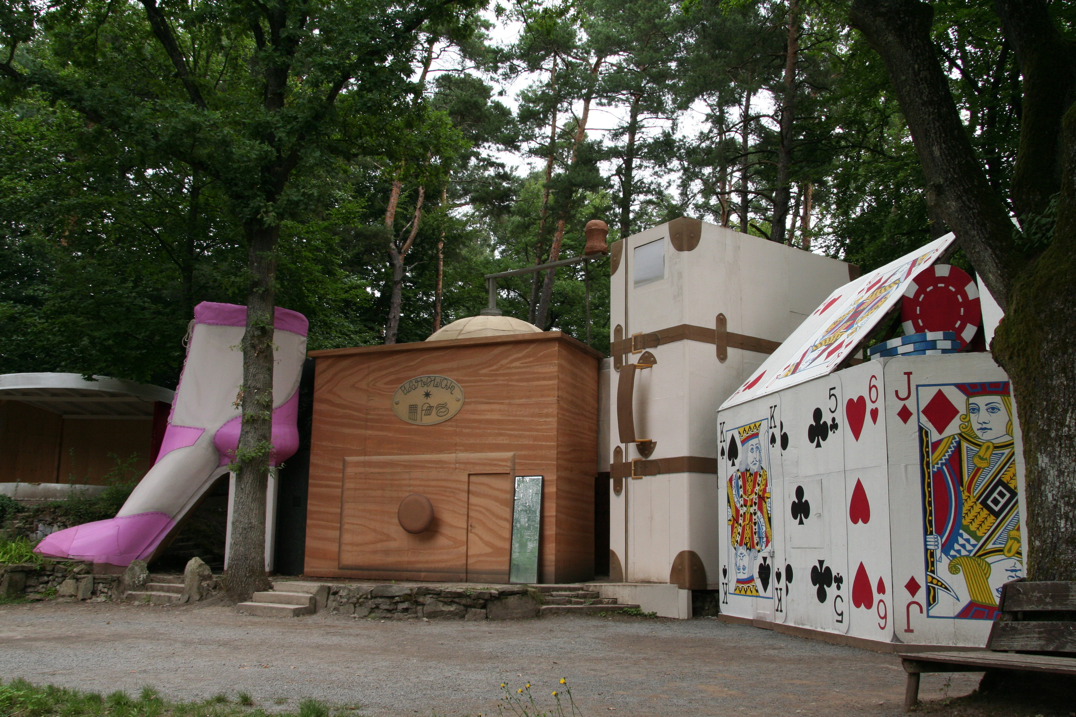 Kulisse des Naturtheaters Renningen in der Spielzeit 2011